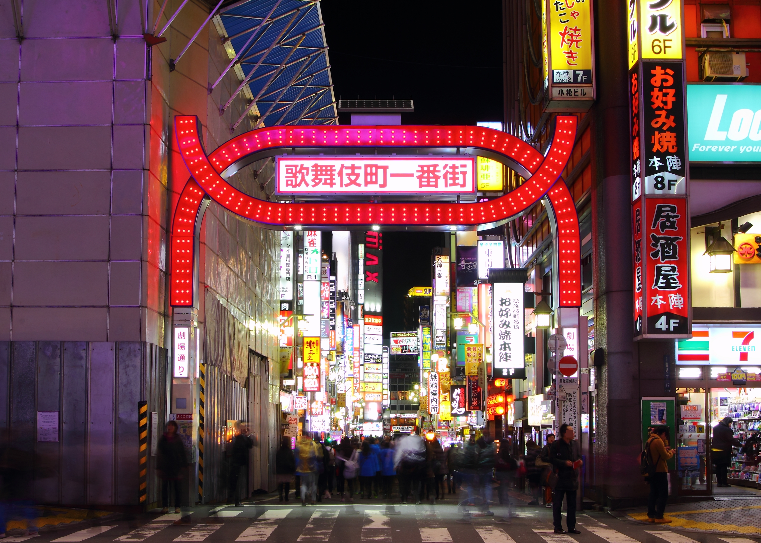 歌舞伎町一番街（新宿区）